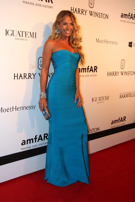 2 - Adriane Galisteu-001